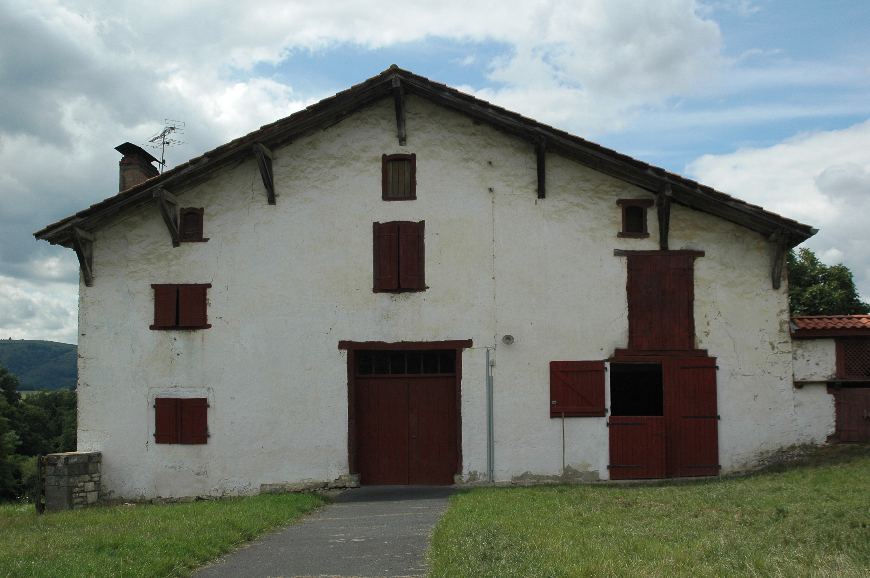 Vieille ferme à Arhansus